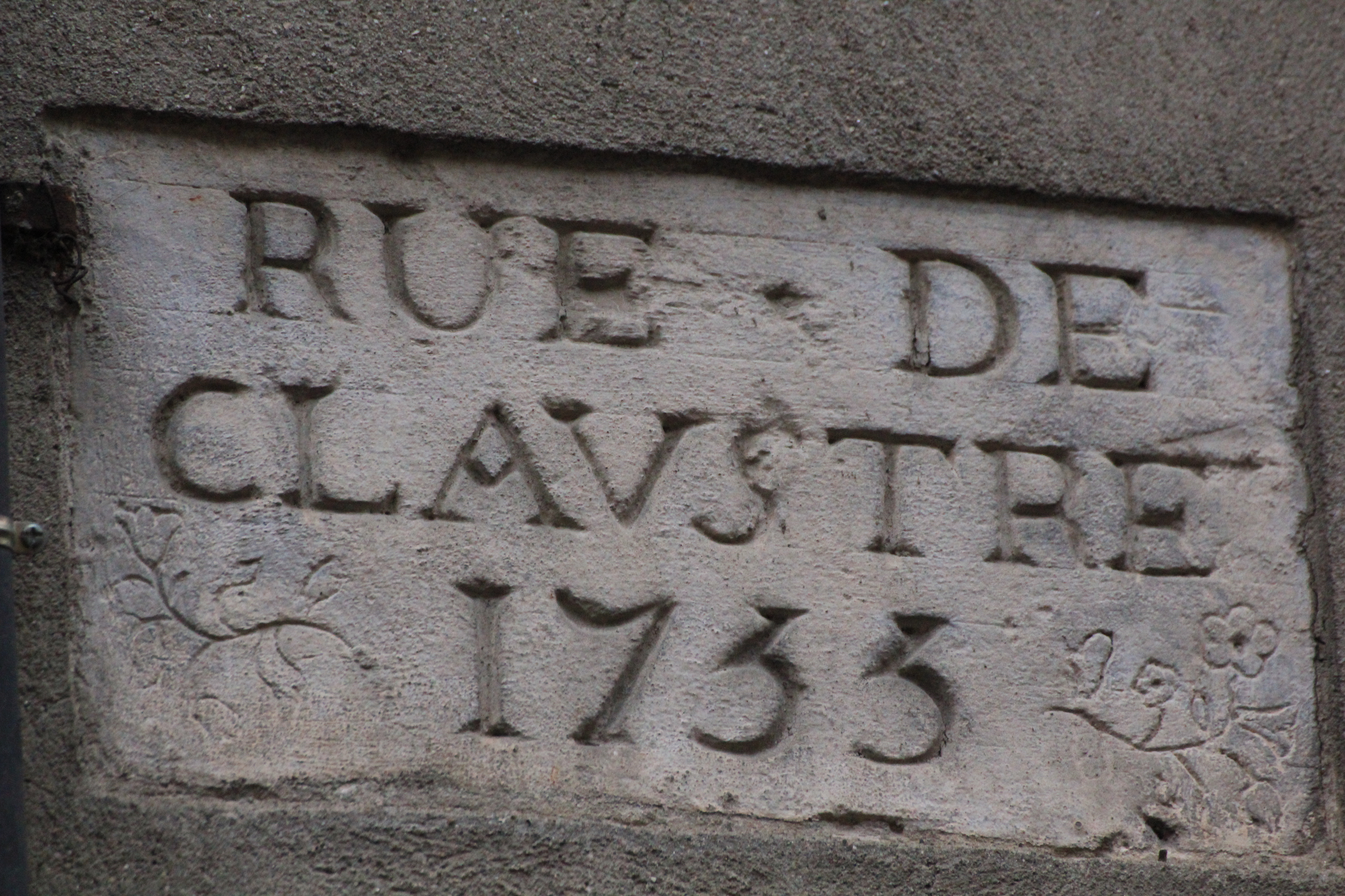 Rue de Claustre à Toulouse (maintenant la rue du Taur).